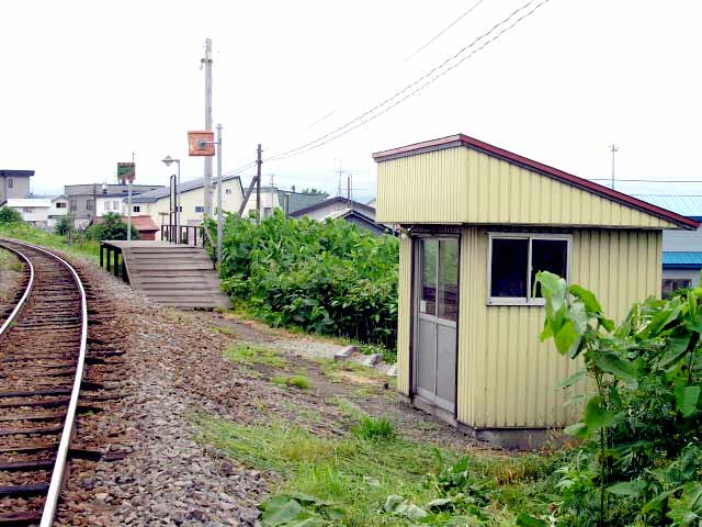 全景 撮影場所 箸別駅構内 撮影者によるGFDLリリース